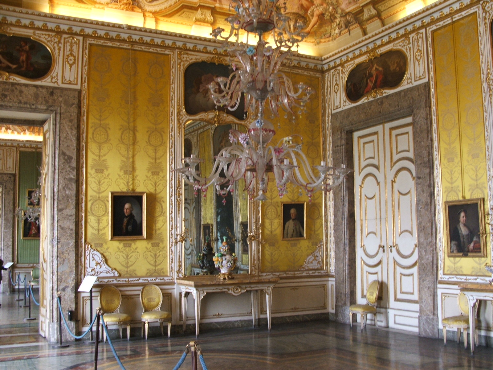 Caserta, immagini dalla Reggia di Caserta